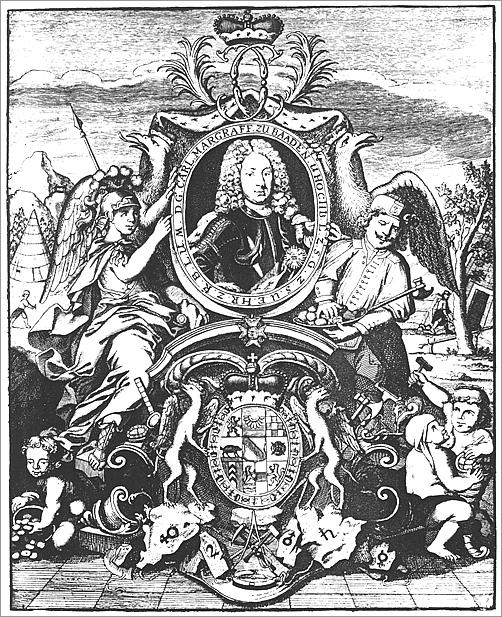 Markgraf Karl Wilhelm von Baden-Durlach (1679-1738)